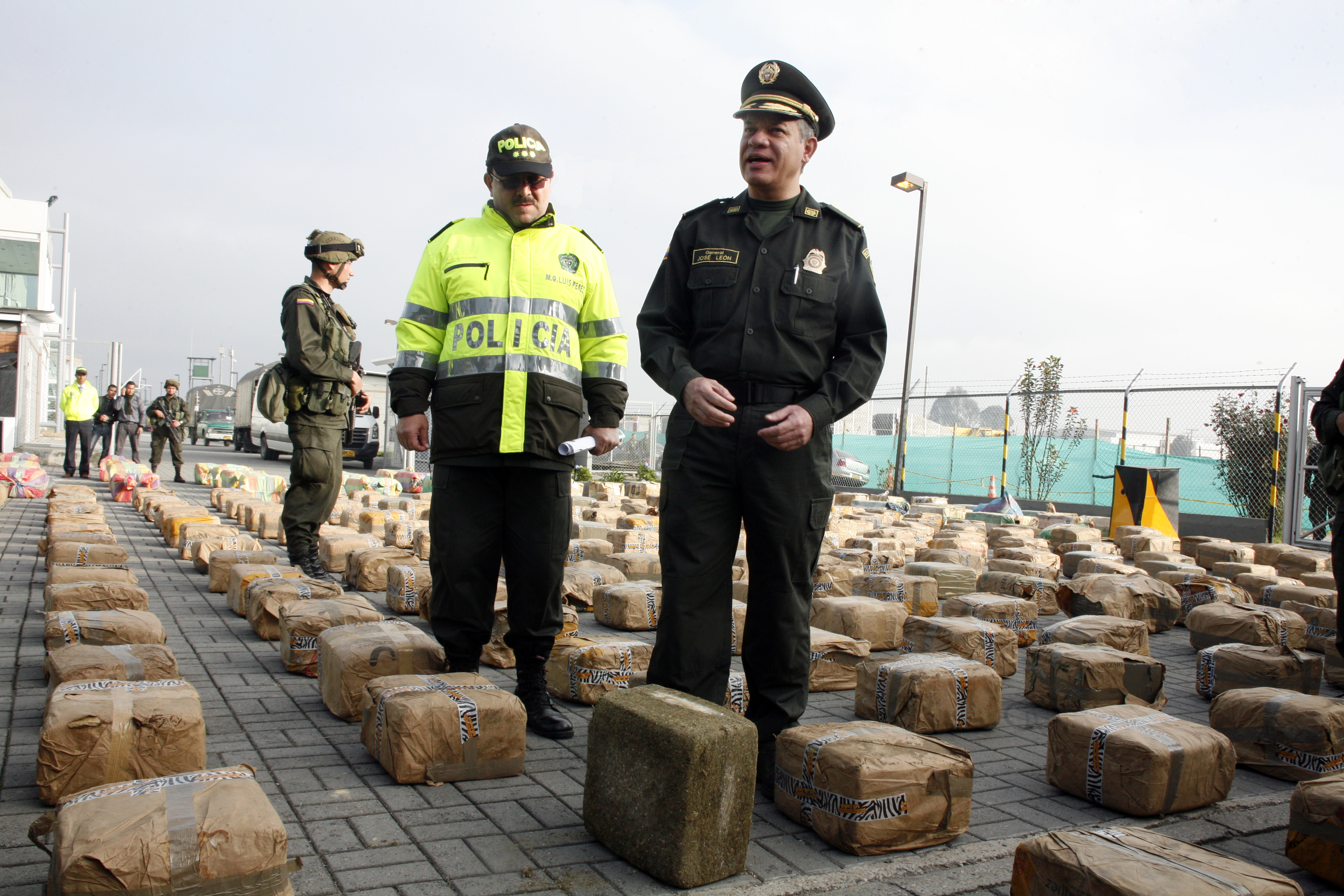 Iba para los ganchos que surten el microtráfico y narcomenudeo en la capital de la República En 2 mil millones de pesos se afectaron las finanzas de estas redes criminales.